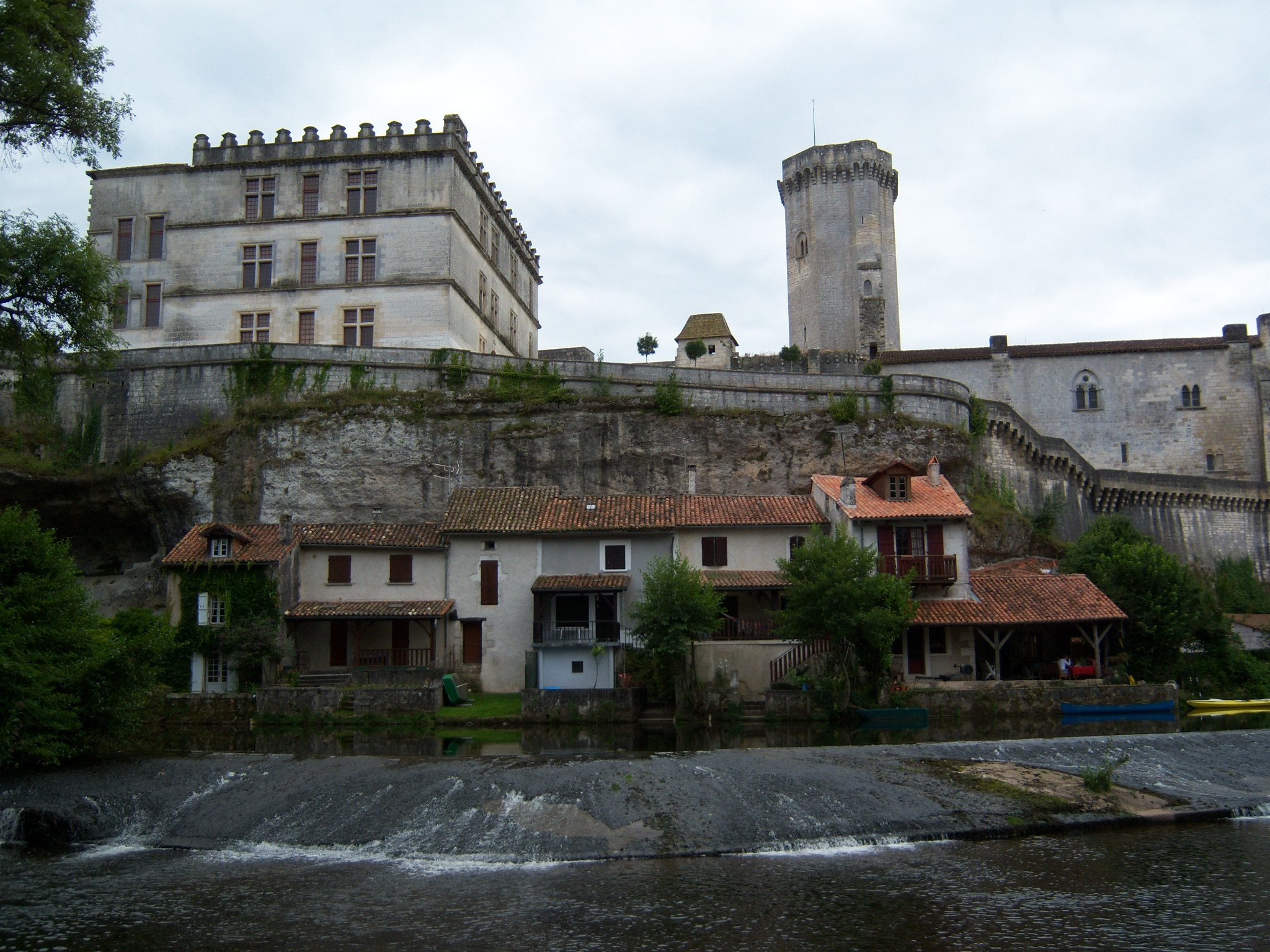 Palais Renaissance et donjon de Bourdeilles